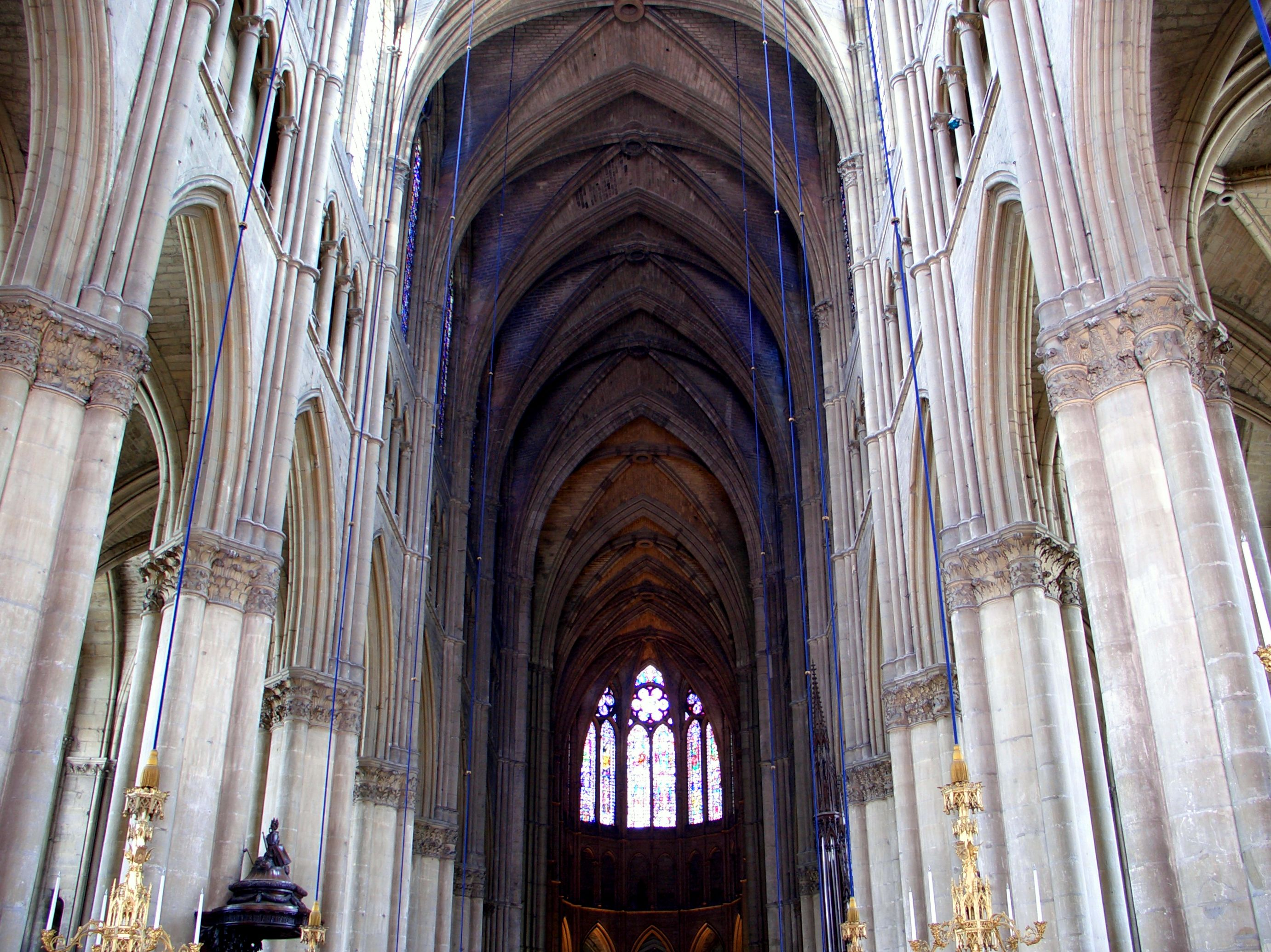 Nau central de la Catedral de Reims, França.